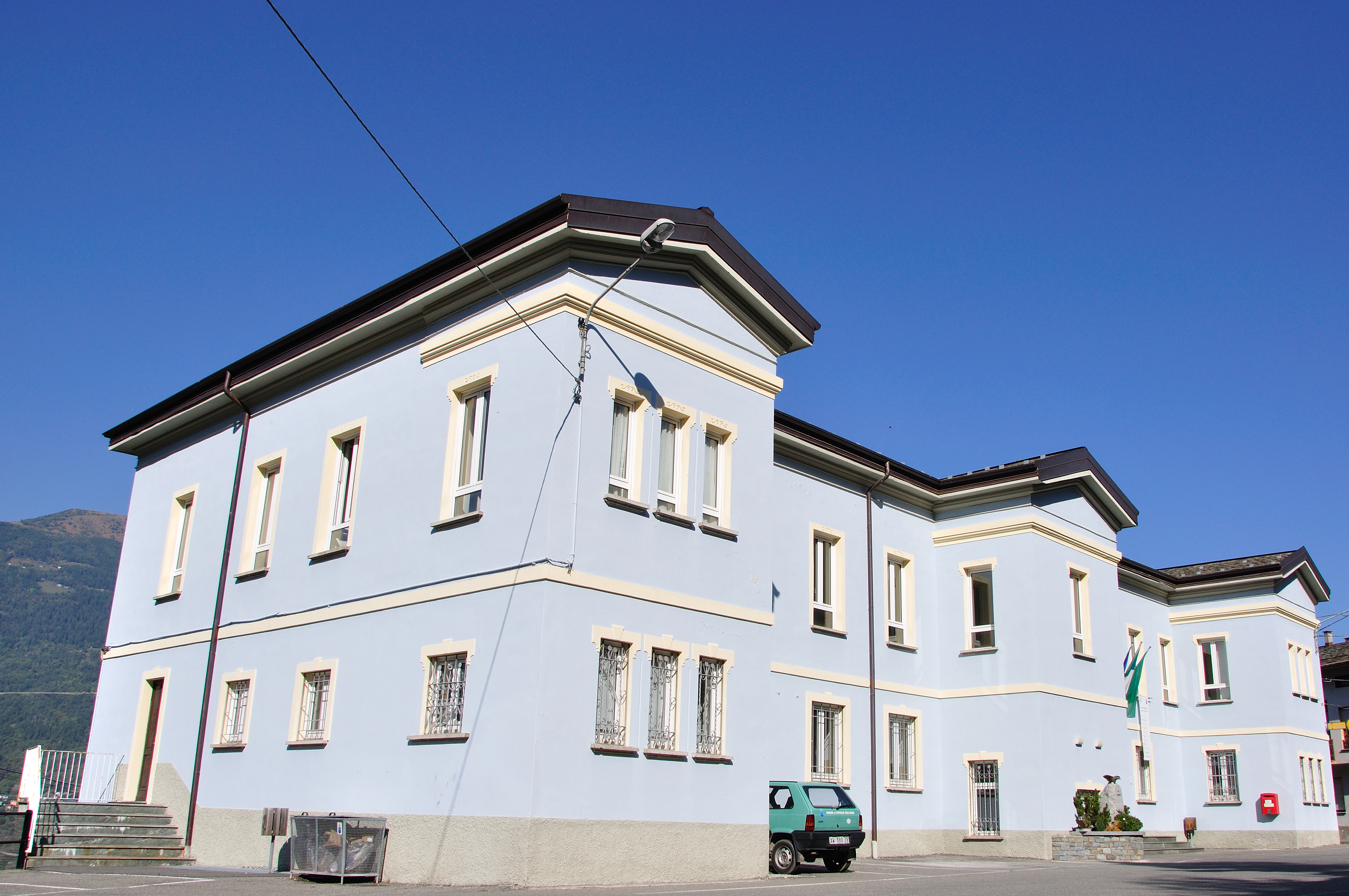 Municipio di Castello dell'Acqua (SO)